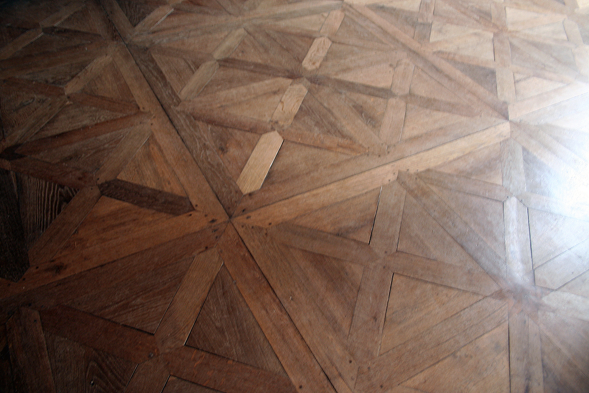 Parquet de la sacristie de l'église de l'abbaye Saint-Sever-de-Rustan, Hautes-Pyrénées, France